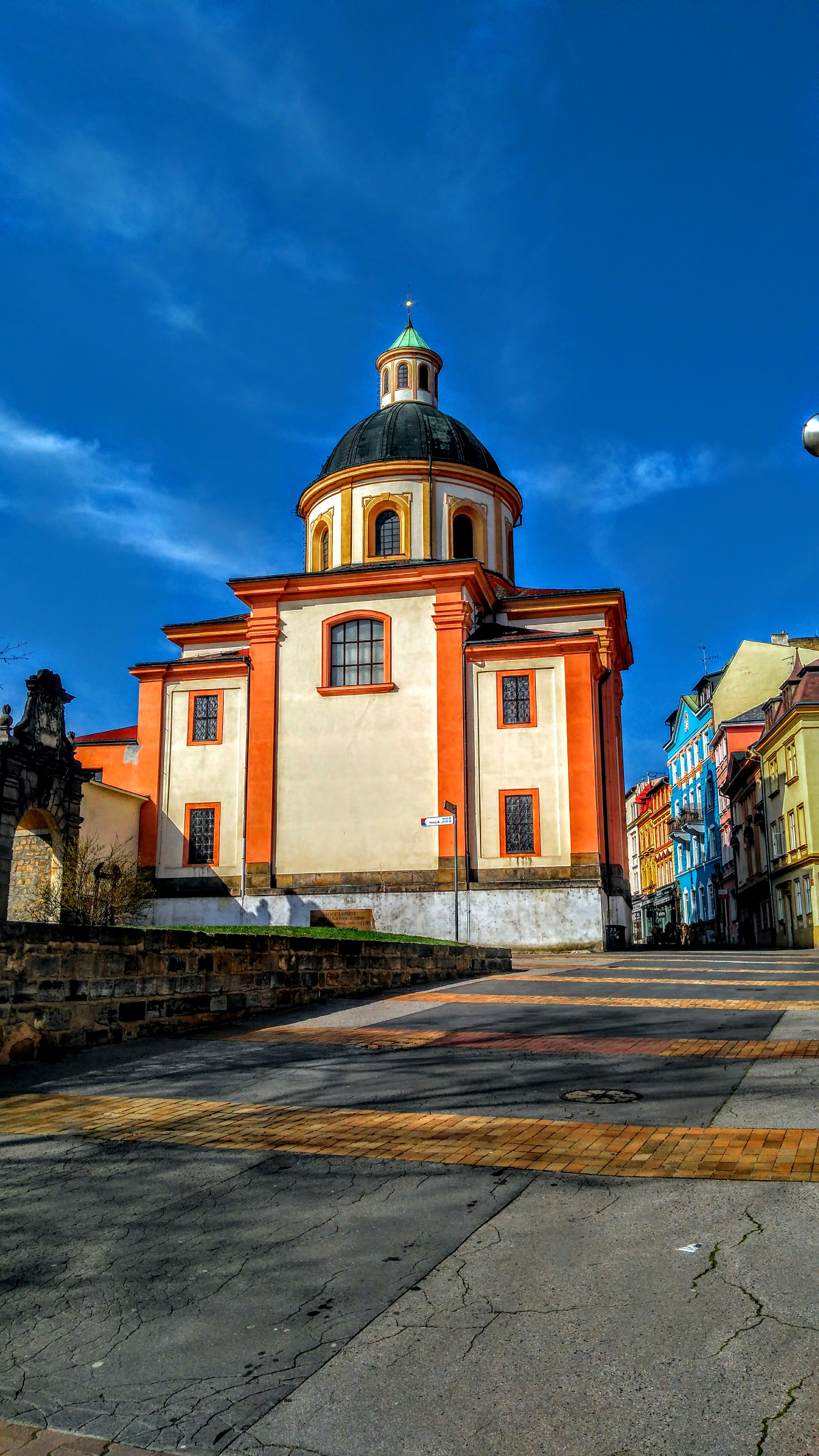 Kostel Povýšení svatého Kříže v Děčíně, pohled z východu.